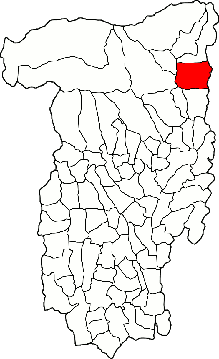 Lage der Gemeinde Perișani im Kreis Vâlcea (RO).